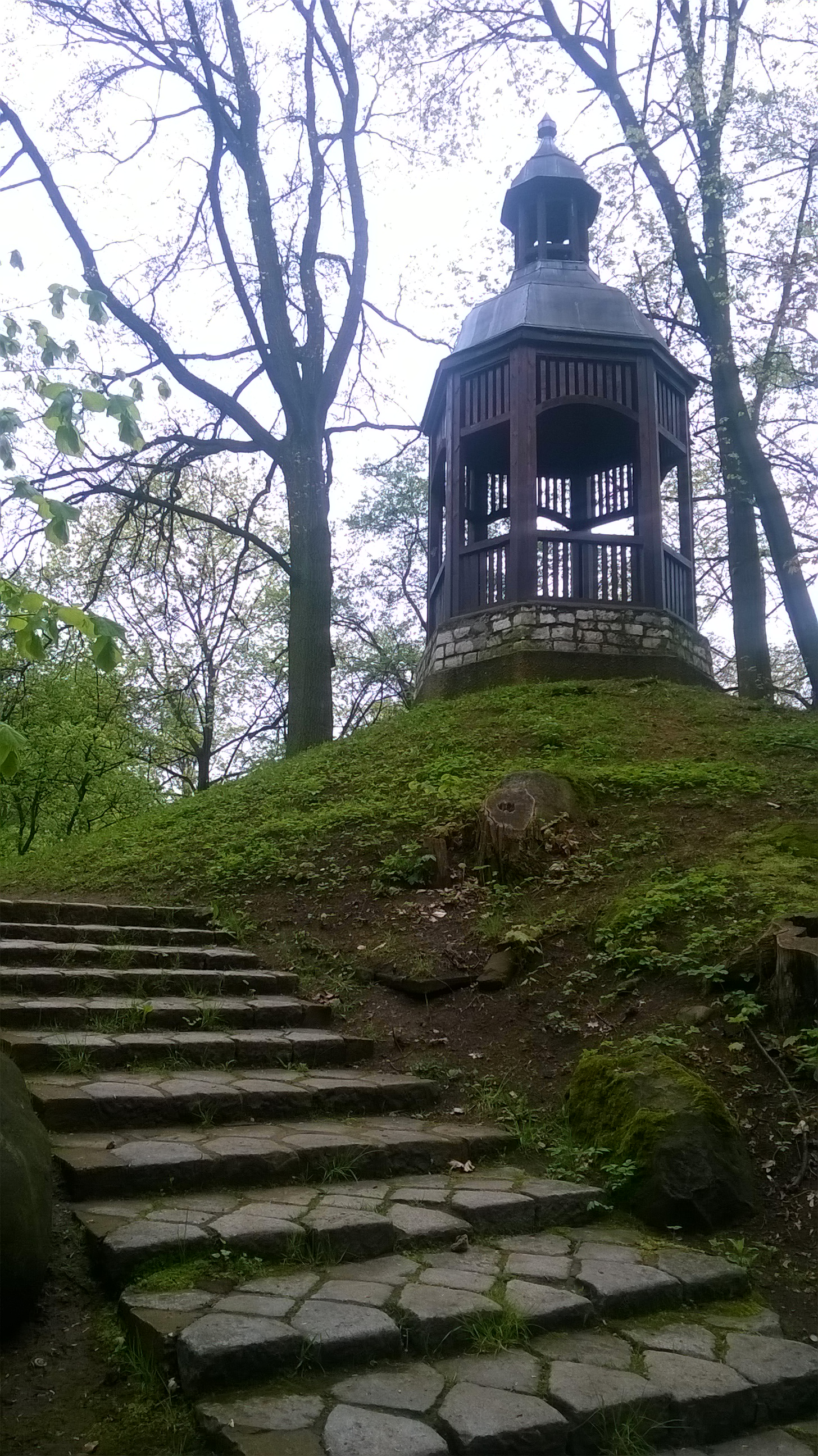 Tarnowskie Góry - wieżyczka w parku miejskim